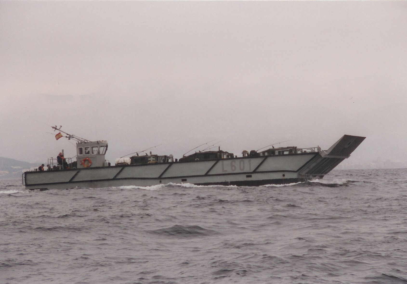 Lancha de desembarco (L-601), clase LCM-1E de la Armada Española, en Málaga.